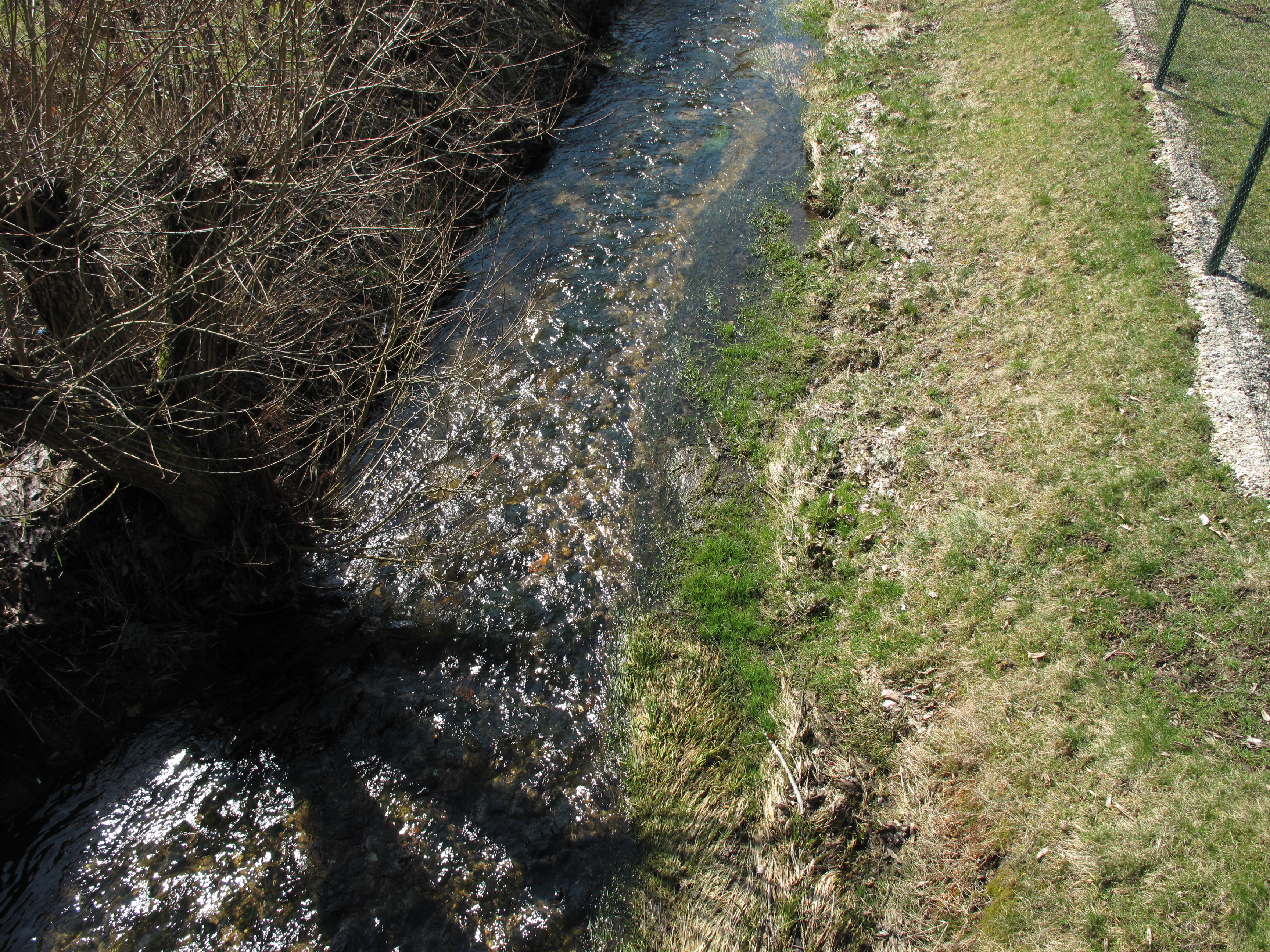 Potok v Loučné nad Nisou. Okres Jablonec nad Nisou, Česká republika.